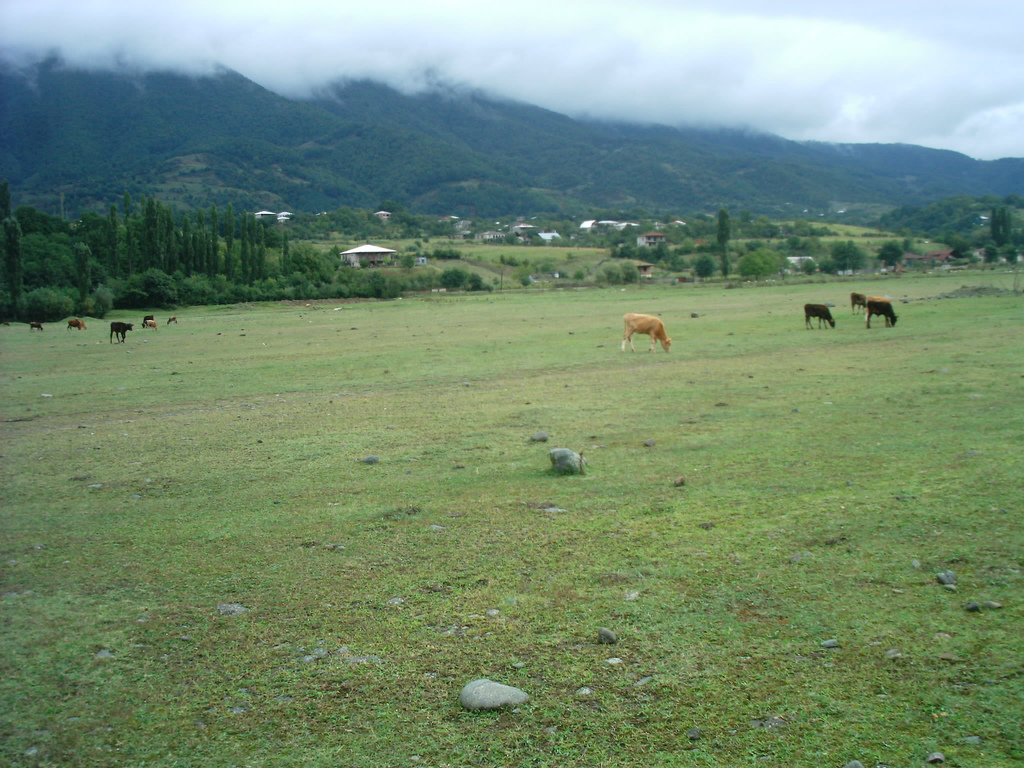 Sachkhere (Georgia) September 2003 (ehemalige Flugpiste; former airfield; бывшая взлетно-посадочная полоса; dawne pole wzlotów (auf Deutsch; in German) en español